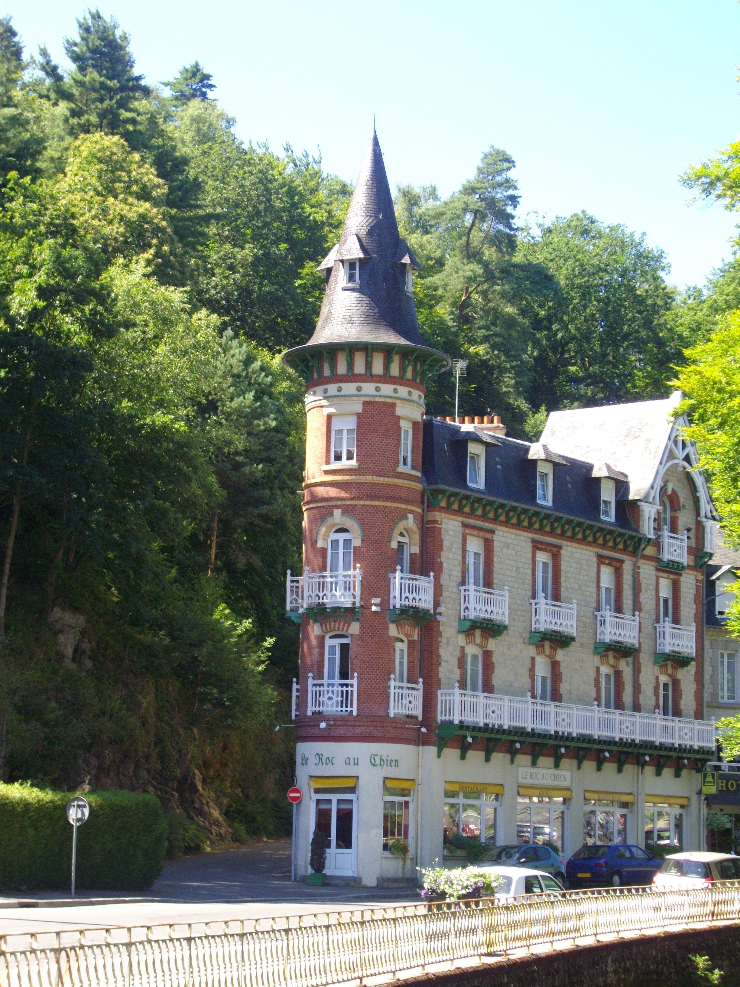 hôtel de voyageurs dit le Roc au Chien, à Bagnoles-de-l'Orne, Normandie, France